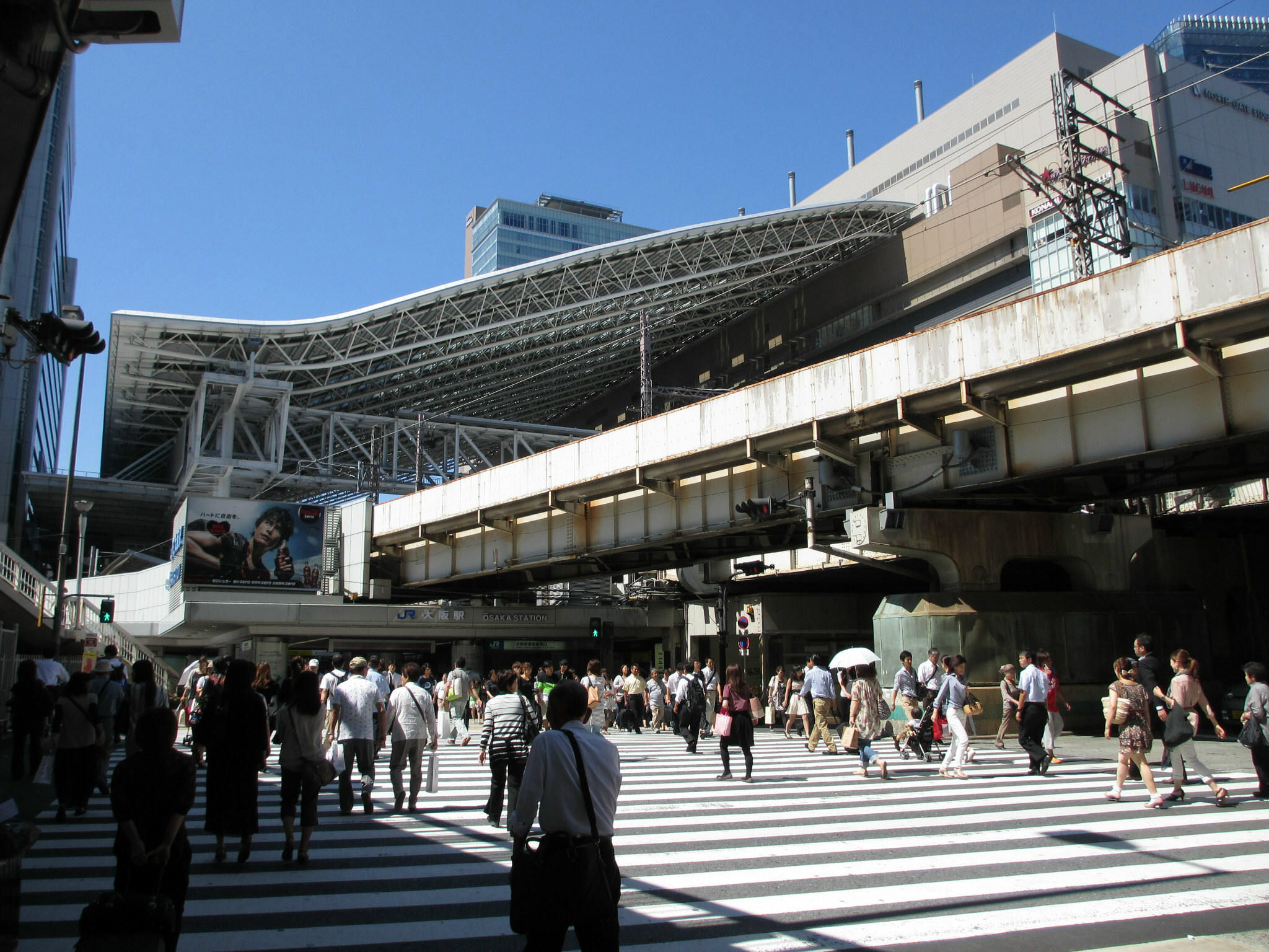 JR Osaka Station